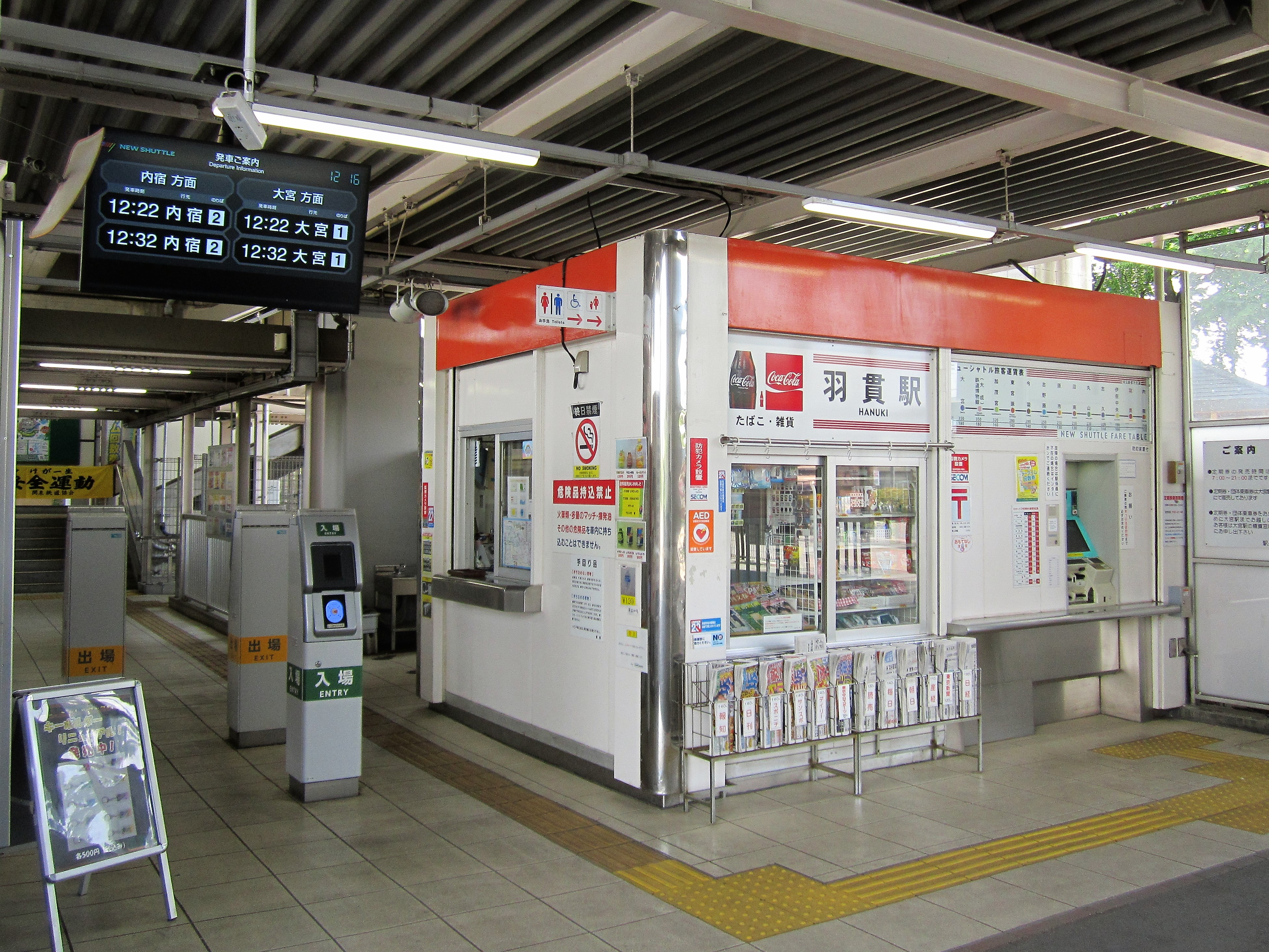 埼玉新都市交通 羽貫駅 Canon PowerShot A2200